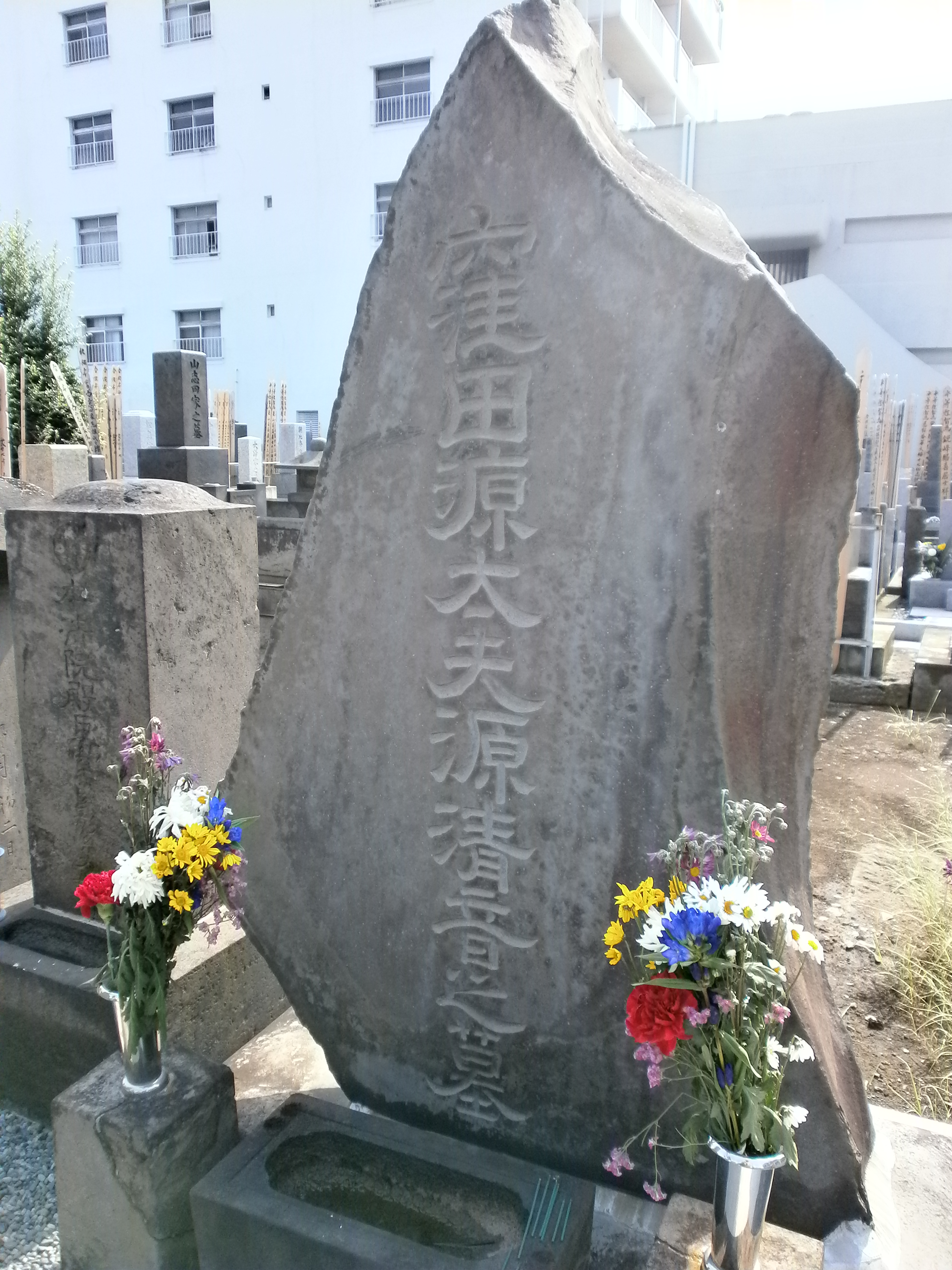 幕府講武所頭取・窪田助太郎清音墓